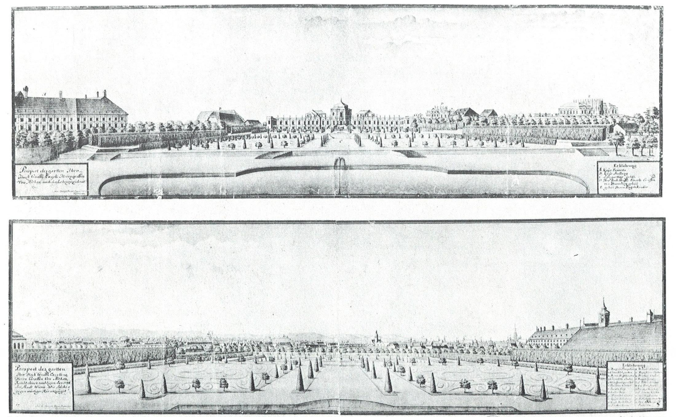 Gartenschloß Althan auf der Wieden mit Ausblick auf Wien um 1720. Images of the Palais Czernin-Althan, aroudn Favoritenstraße, Rainergasse and Mayerhofgasse in Vienna's IV. district Wieden.